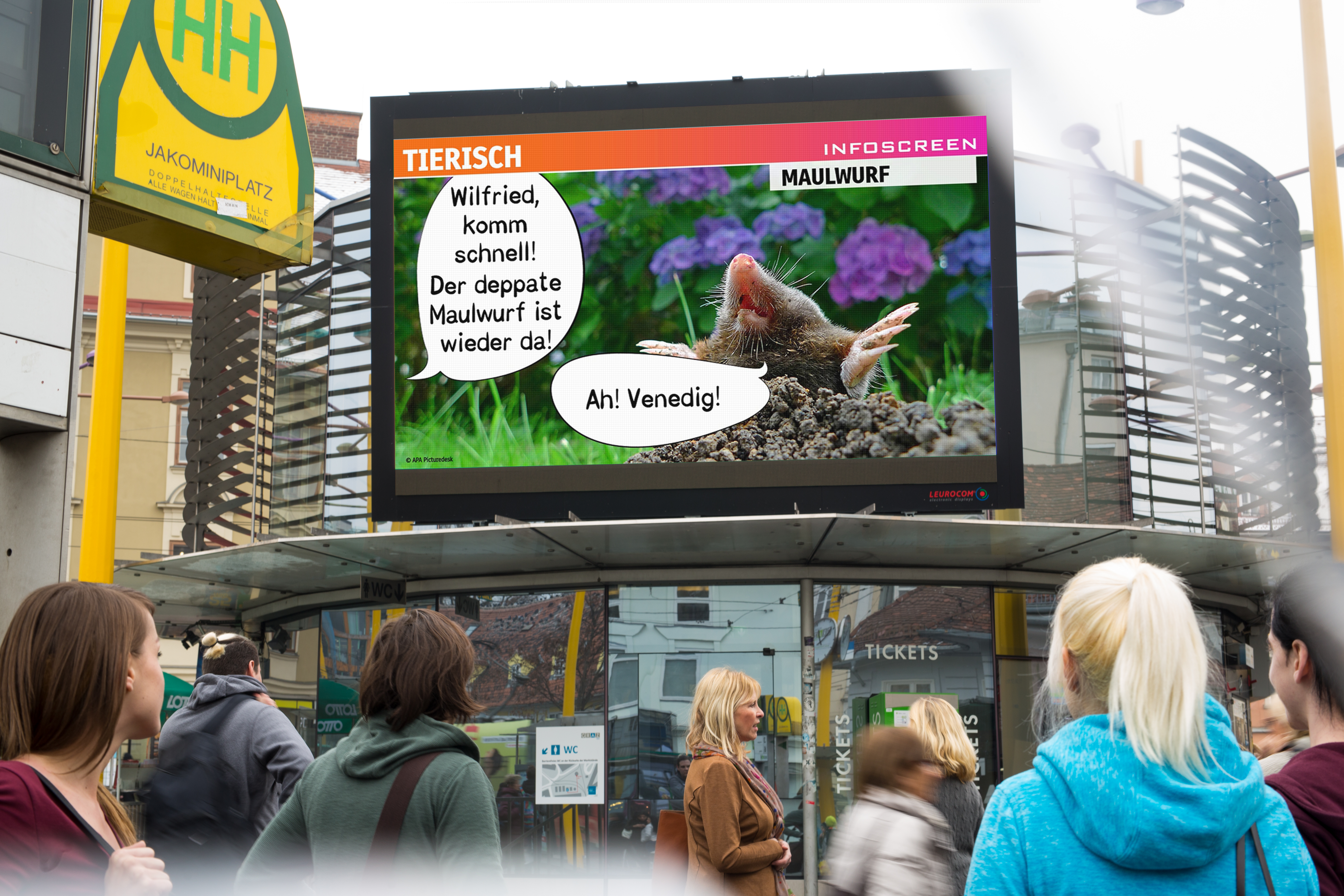 Station Screen von Infoscreen Austria GmbH in Graz